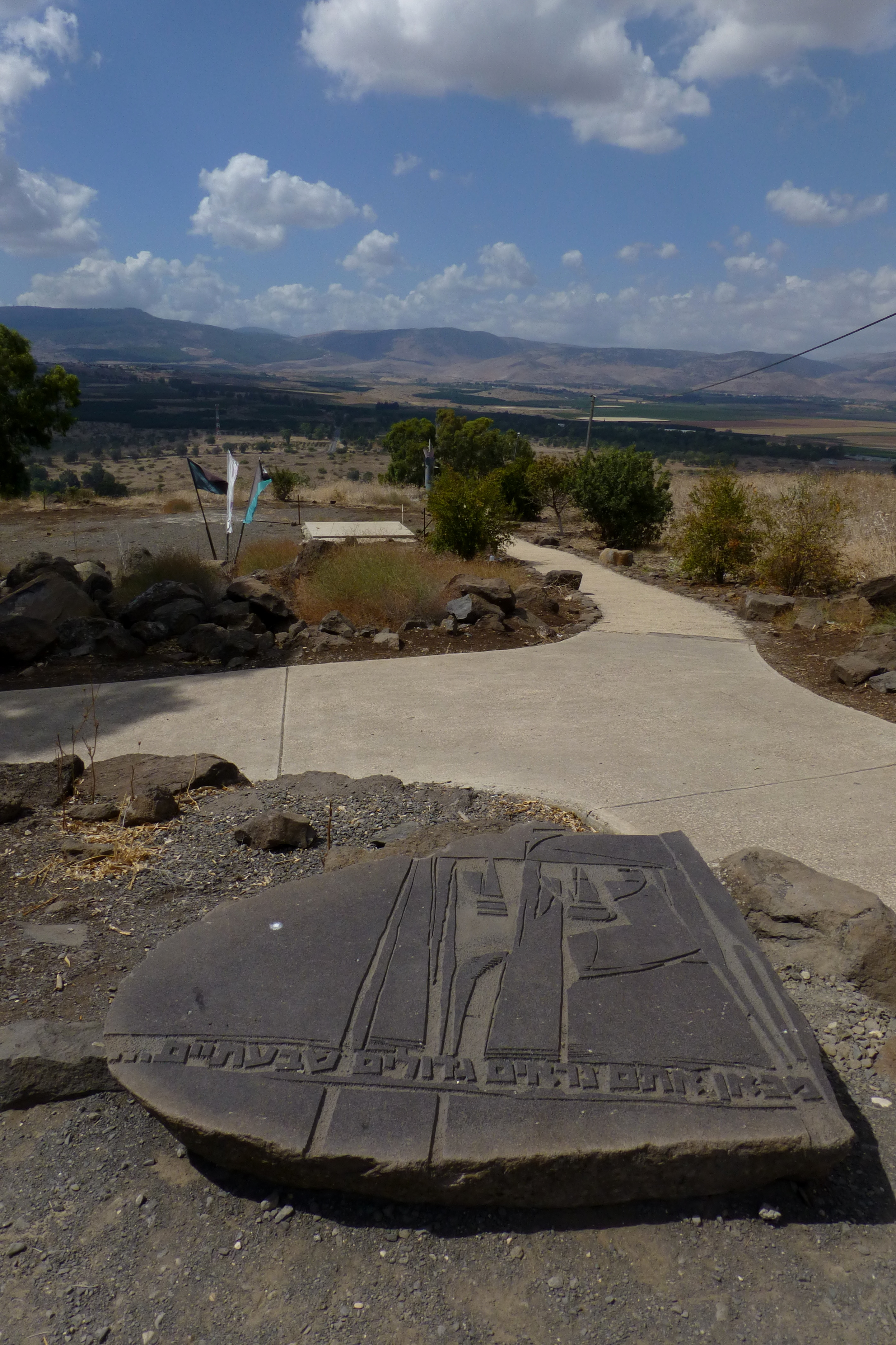 הגלעד לנופלים במלחמת ששת-הימים ובקרבות ההתשה ממוקם במצפה גדות, שהוא אתר הנצחה ומקום תצפית ברמת הגולן. המקום שימש כמוצב סורי הנקרא "(אל)מורתפע" (ב